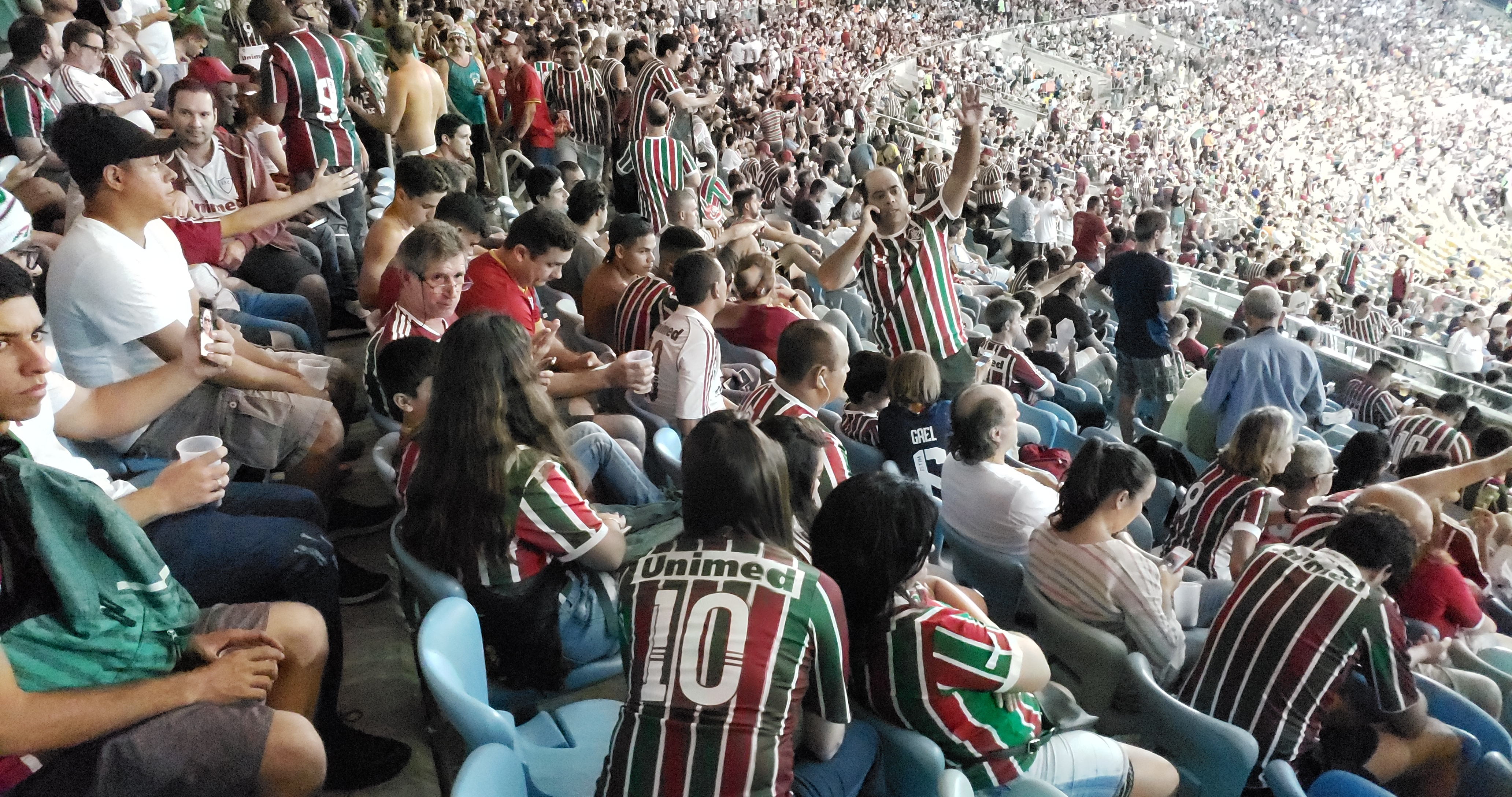 Torcida do Fluminense contra o Atlético Nacional em 23 05 2019 na Copa Sul-Americana.